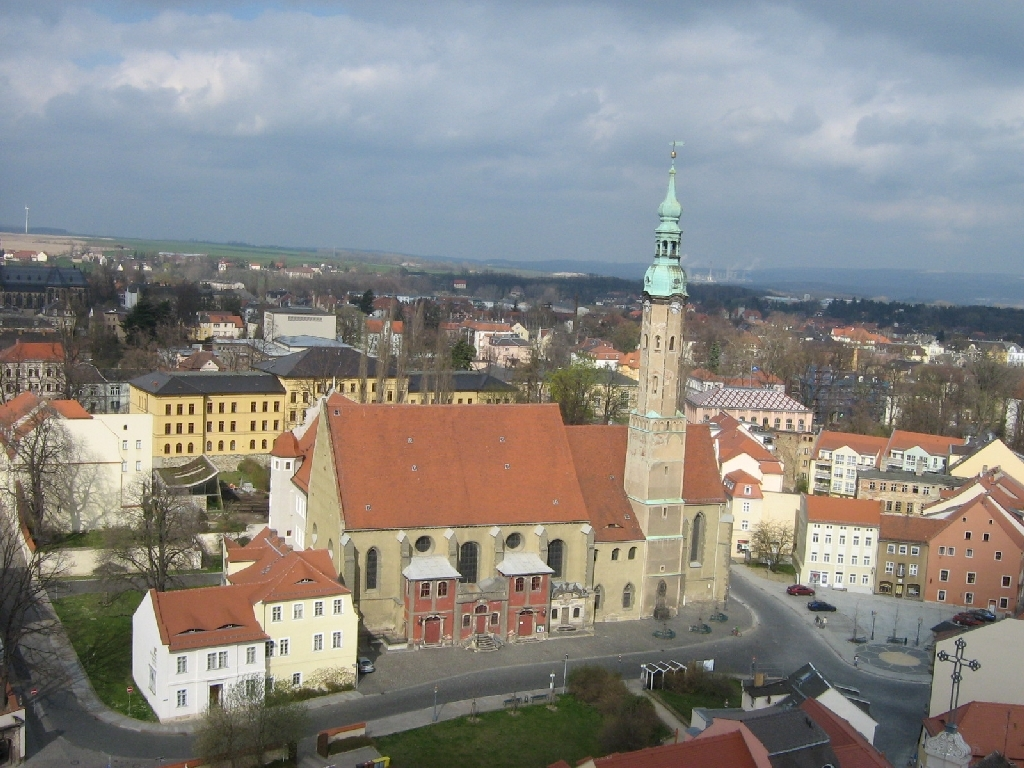 Zittau (Sachsen). Blick vom Turm der evangelischen Johanniskirche mit der Klosterkirche im Zentrum des Bildes